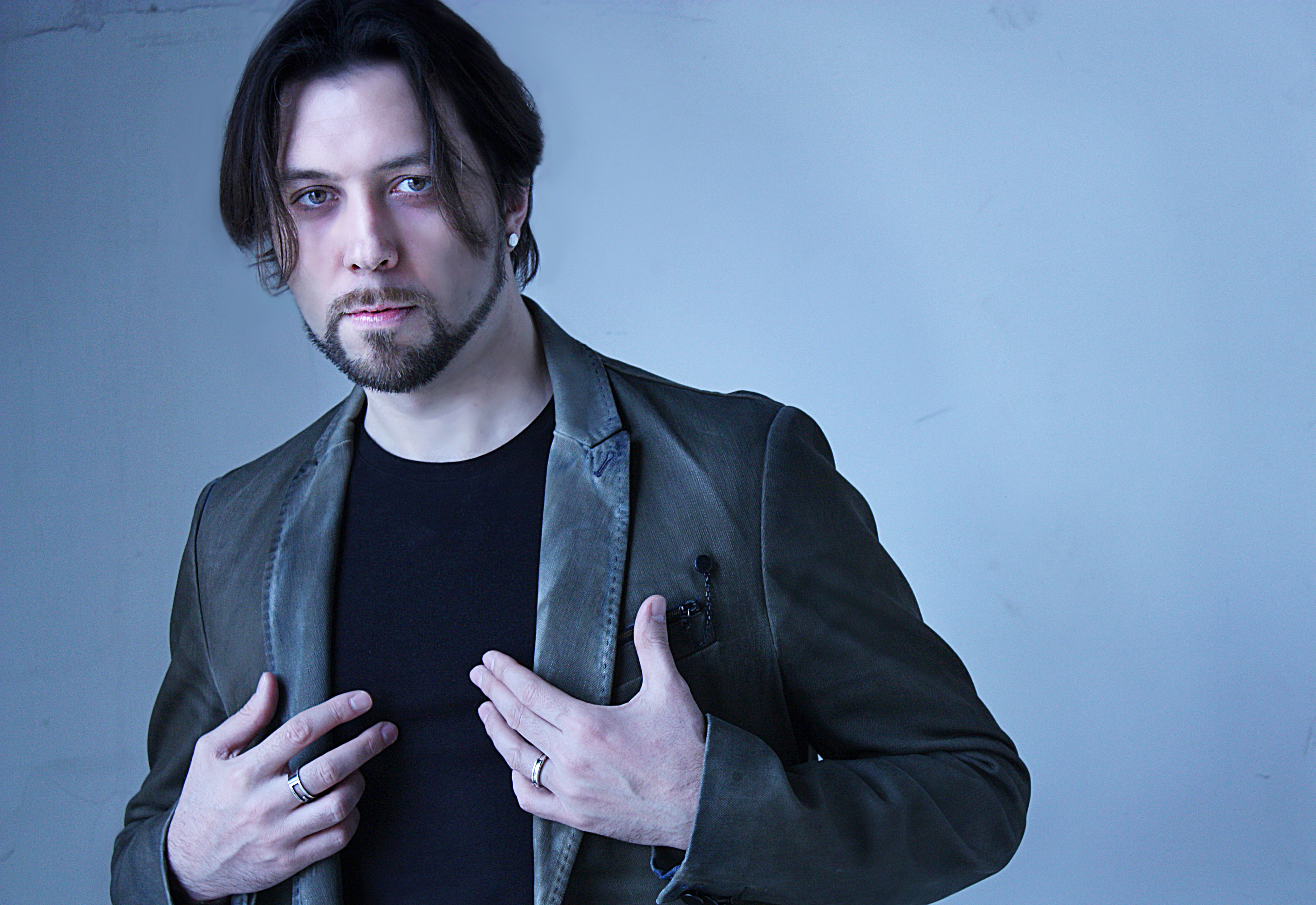 foto alberto pizzo